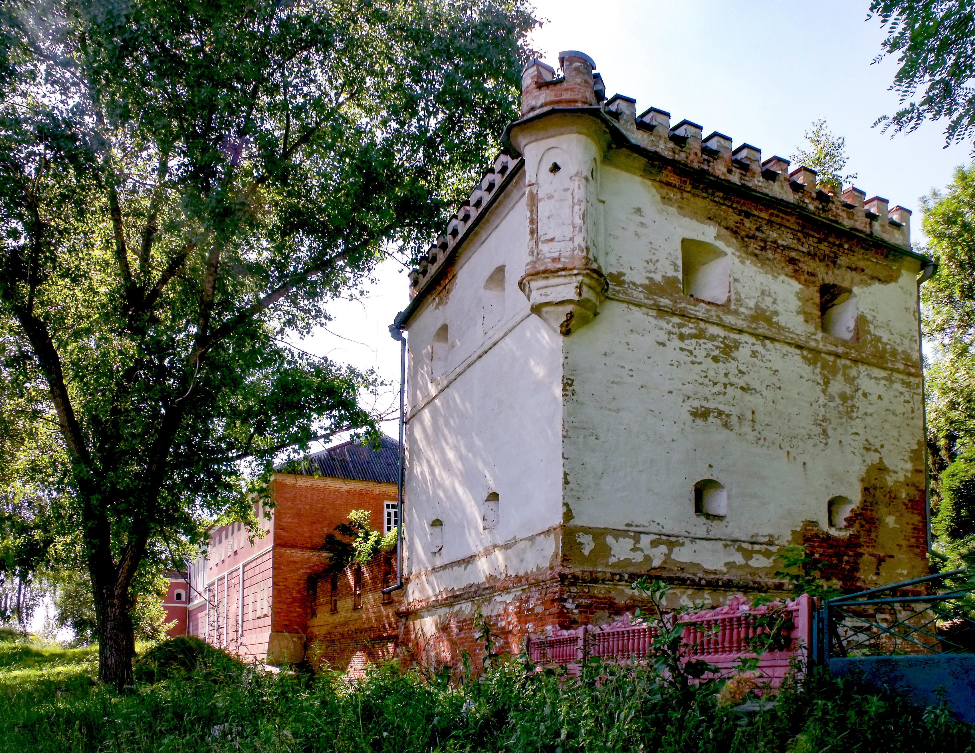 Замок Холоневських: Вінницька обл., Калинівський р-н, с. Іванів, вул. Гагаріна